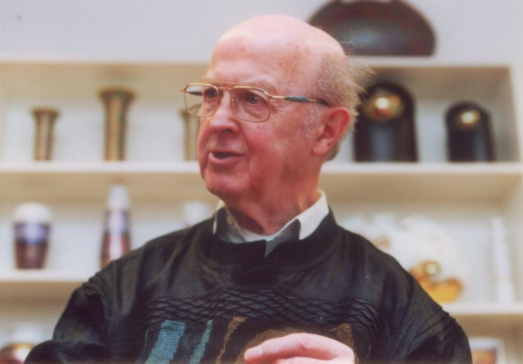 Porträtfoto von Helmut Drexler